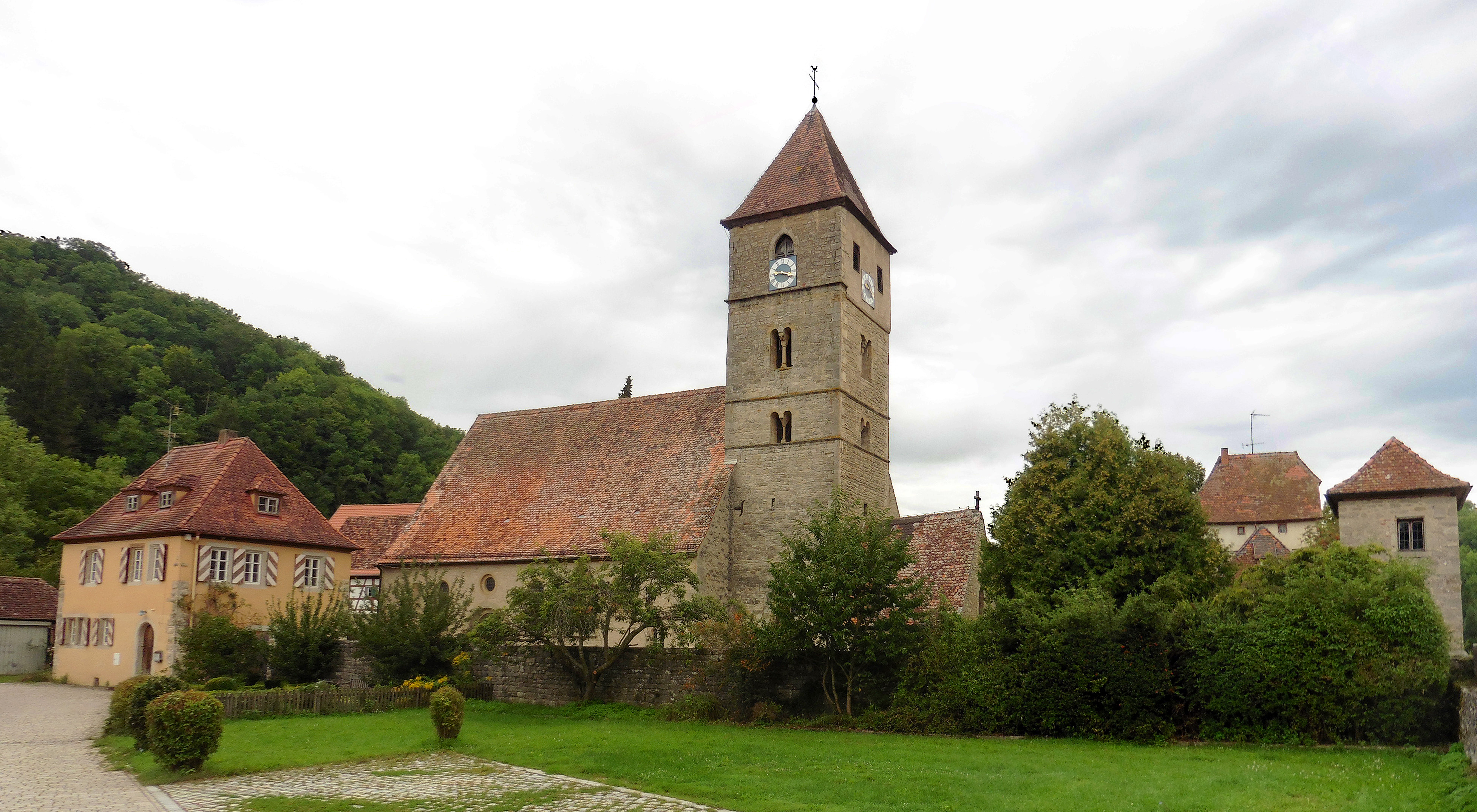 Panorama der romanischen Pfarrkirche St. Peter und Paul in Detwang bei Rothenburg ob der Tauber im Landkreis Ansbach in Mittelfranken. Ansicht von Südosten. This is a photograph of an architectural monument. This is a photograph of an architectural monument.